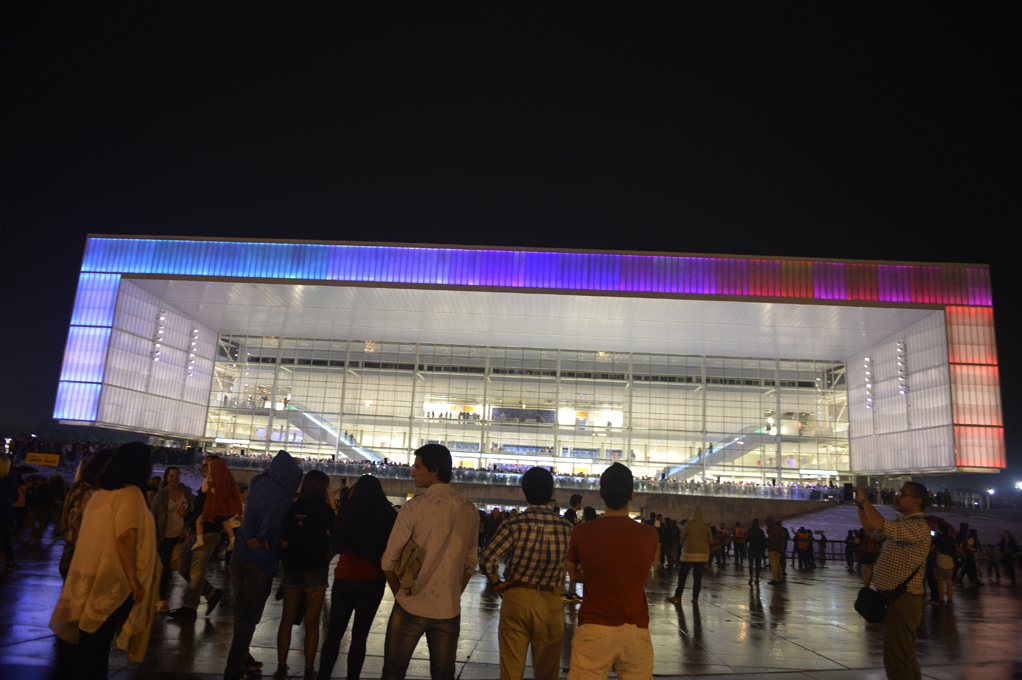 Se inauguró el Antel Arena en una fiesta de música y arte. El Antel Arena abre sus puertas a la cultura